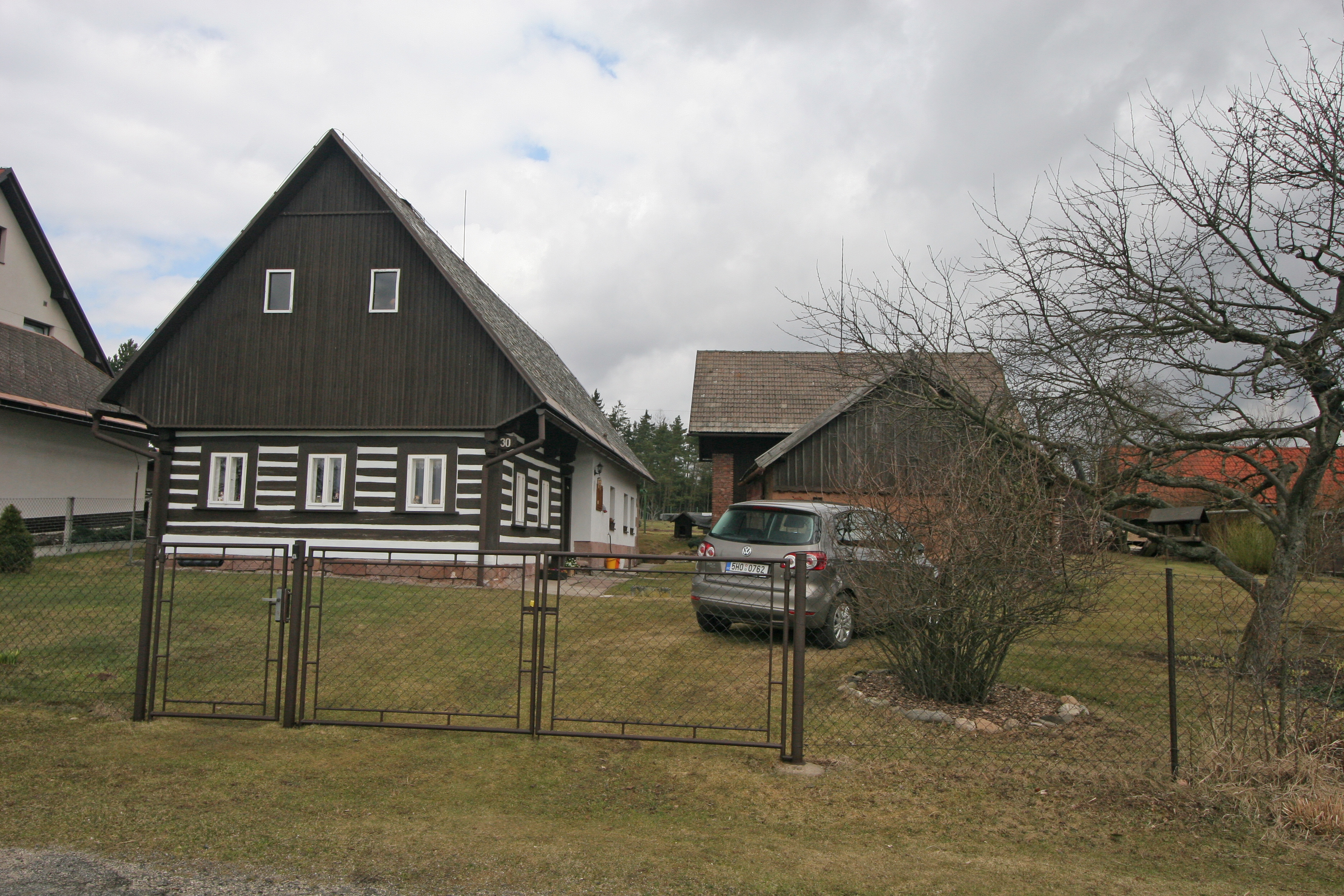 Źďár u Kumburku čp. 30